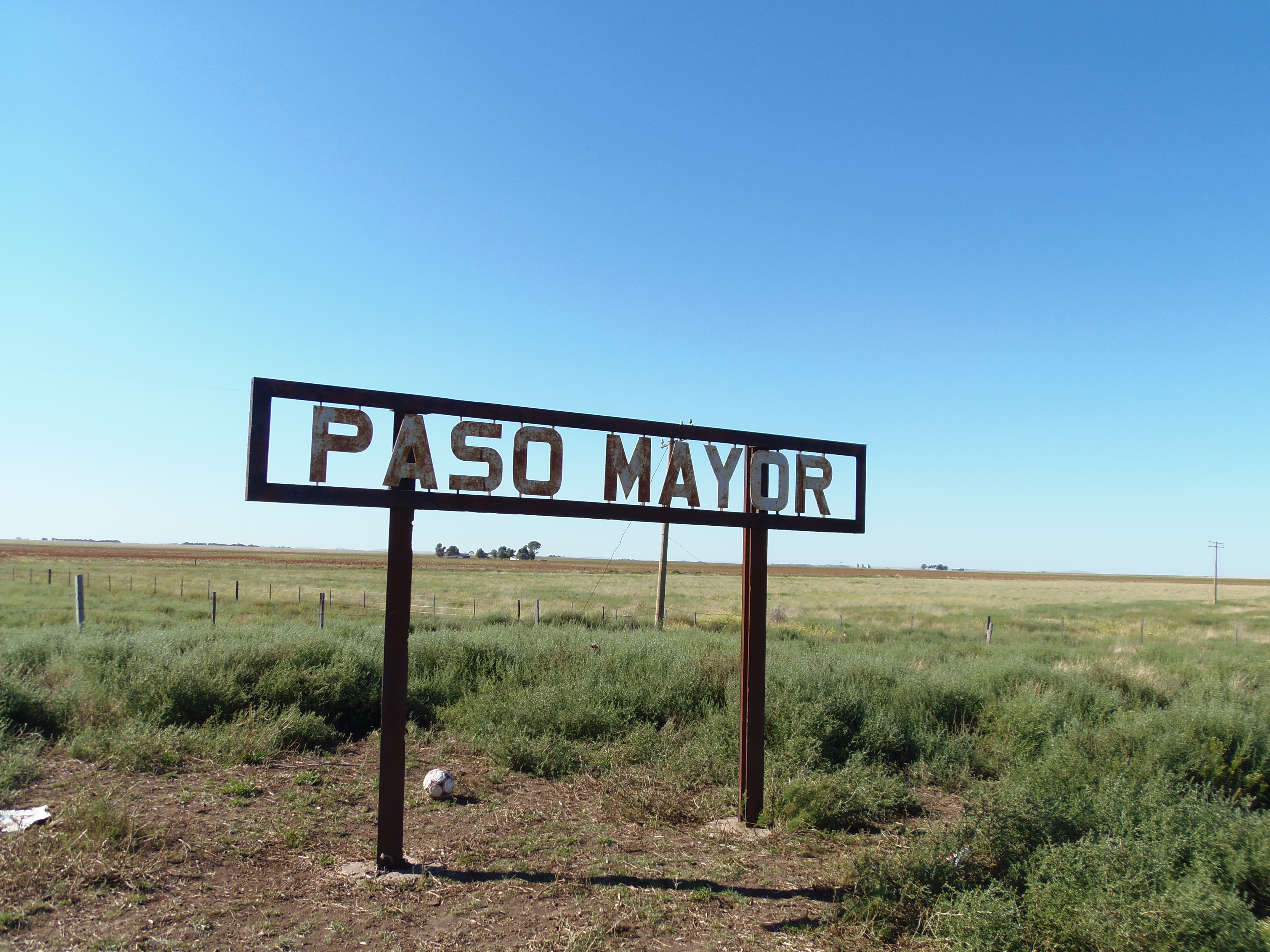 Vieja Estacion Ferroviaria de Paso Mayor.